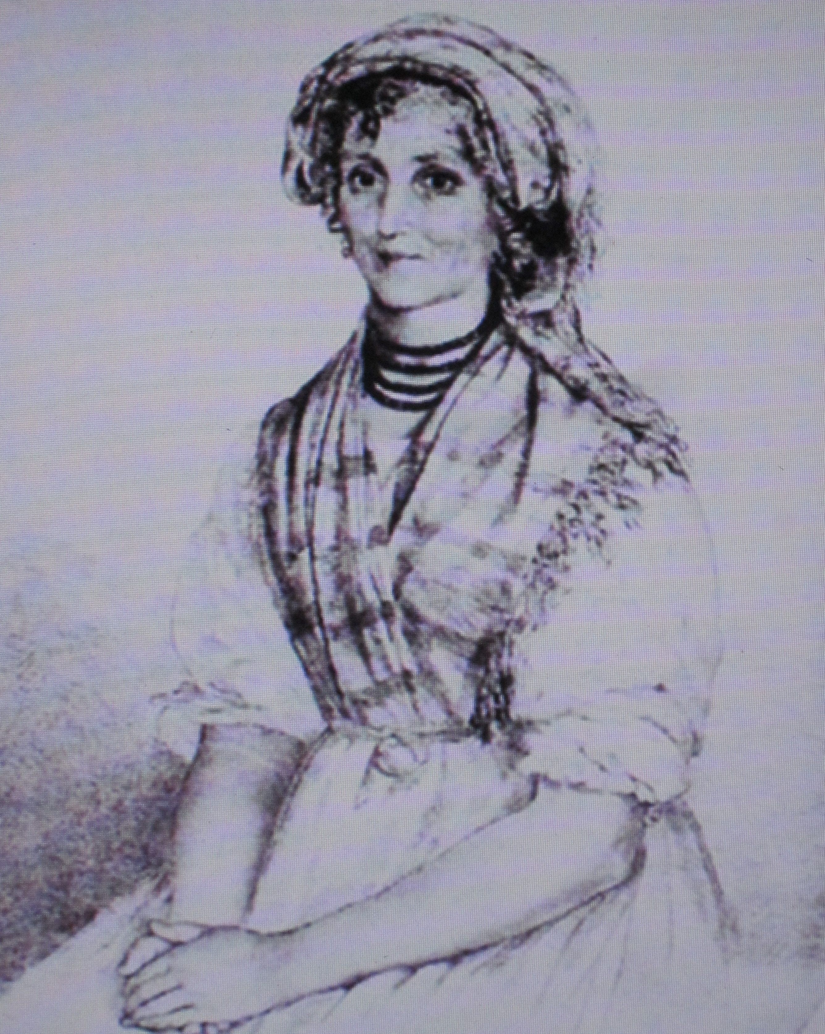 Beatrice di Pian degli Ontani ritratta da Francesca Alexander